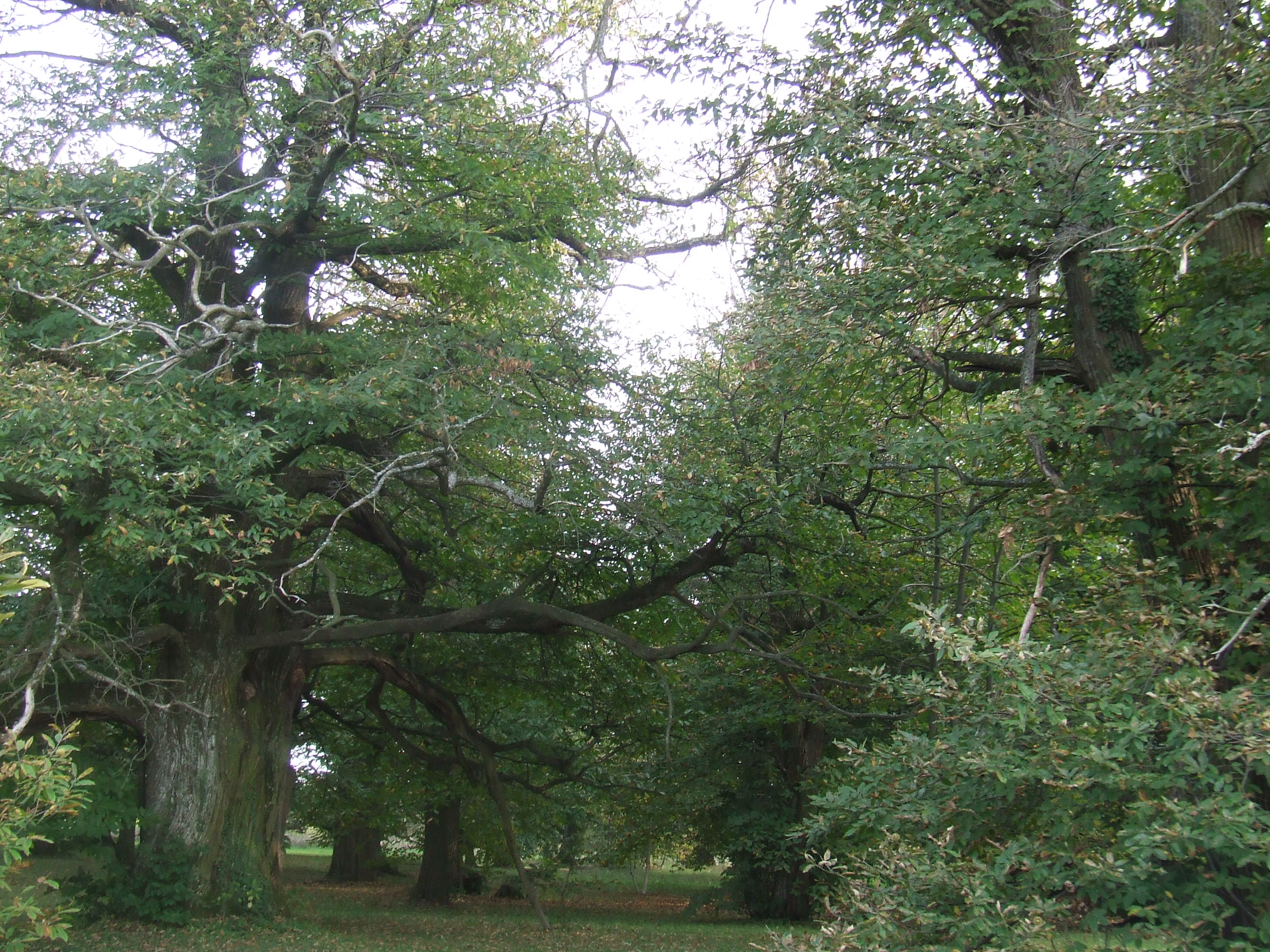 Gesztenyefák:Magyarországon itt található az egyik legnagyobb ültetvény. (Iharosberény)